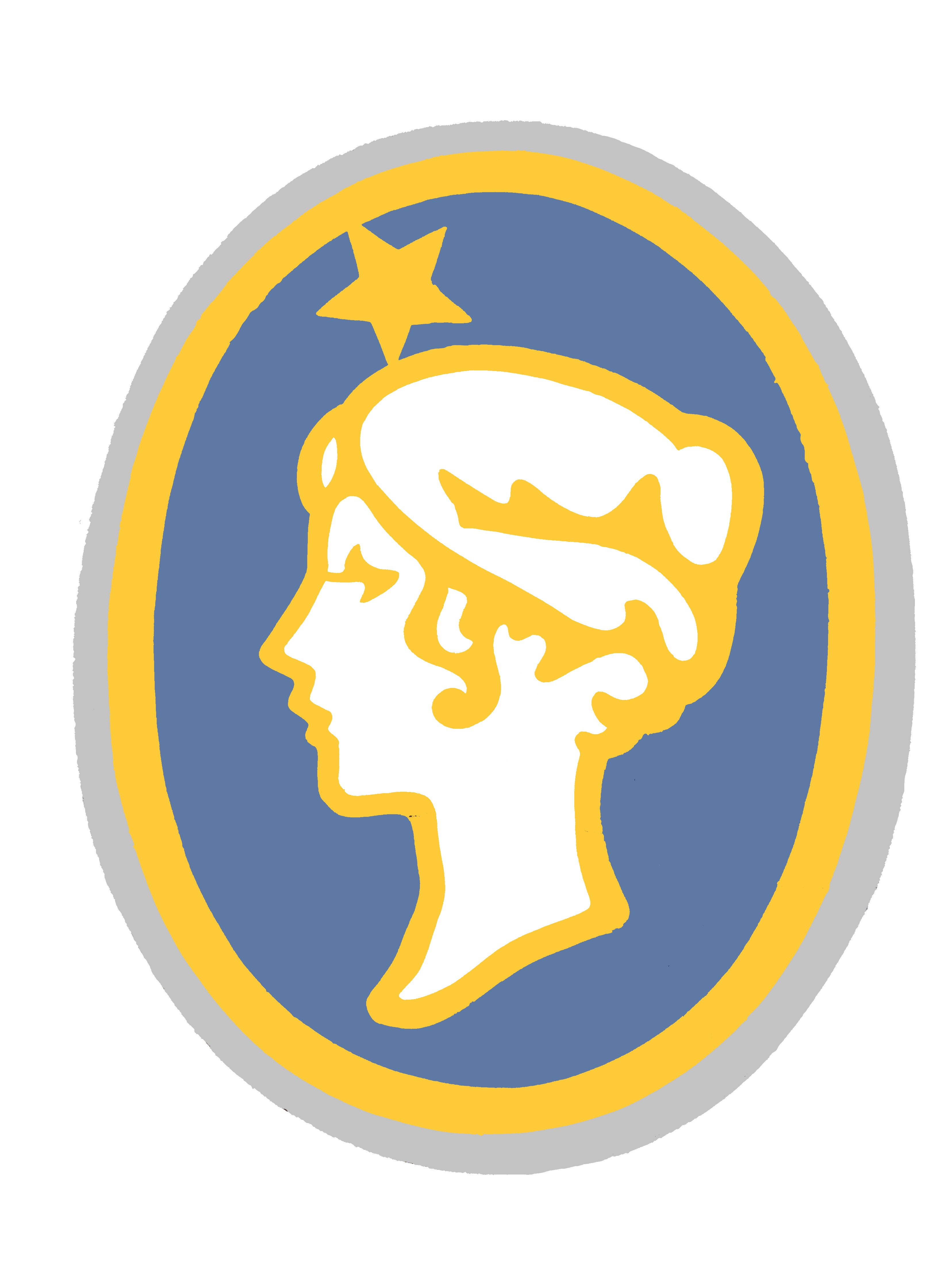 Železniční muzeum Lužná u Rakovníka